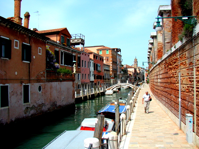 Wenecja, kanał wodny